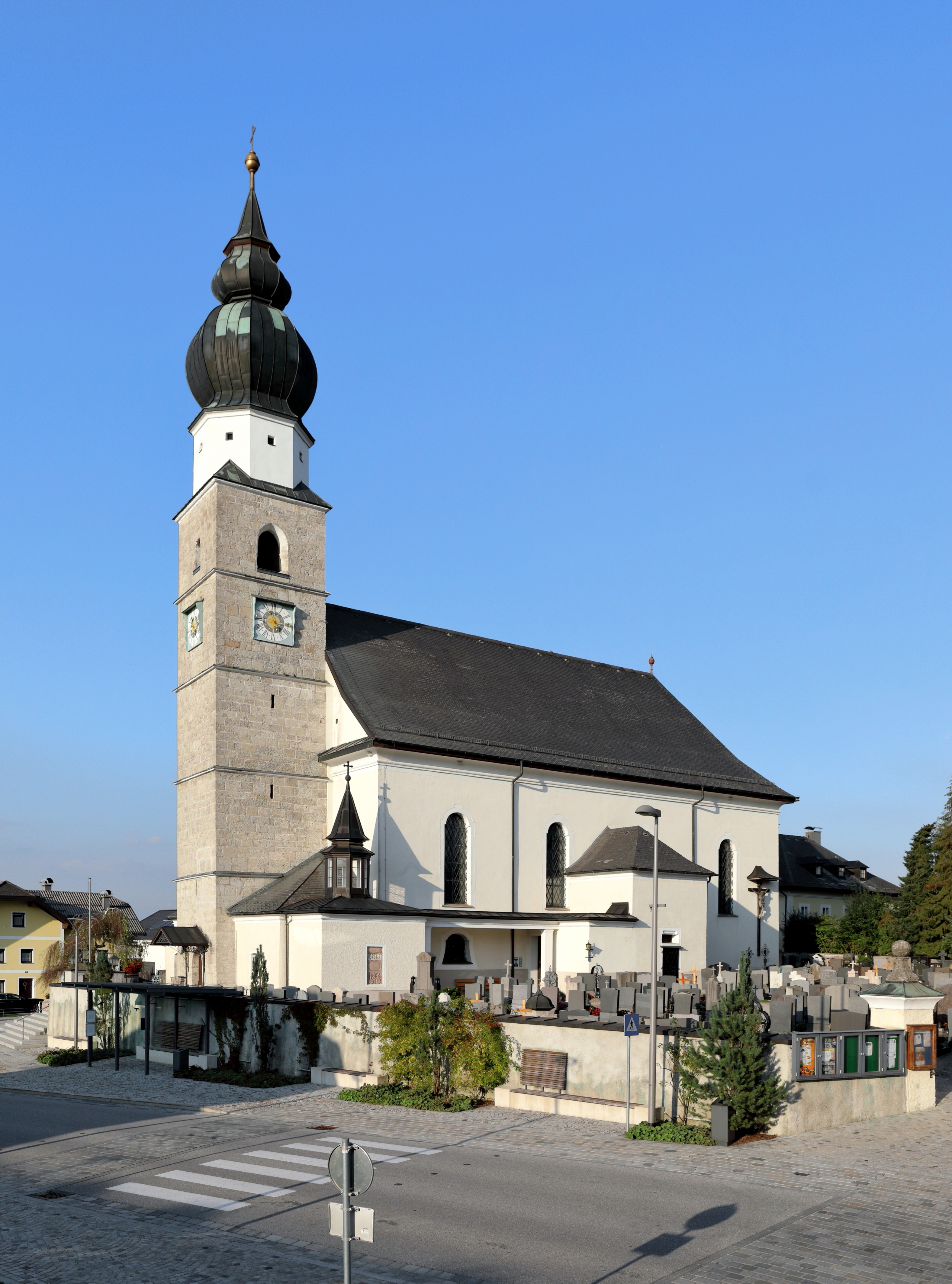 Südwestansicht der röm.-kath. Pfarrkirche hl. Martin in der Salzburger Gemeinde Eugendorf. Die Kirche wurde 1736/1737 nach den Plänen des Hofmaurermeisters Tobias Kendler anstelle einer Vorgängerkirche gebaut, 1763 geweiht und 1857 zur Pfarrkirche erhoben.